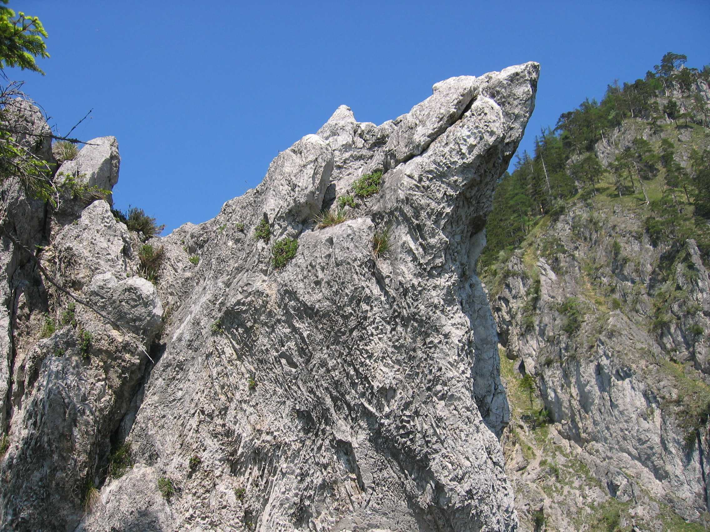 Hauptdolomit Kaltenbachwildnis, Upper Austria, Austria